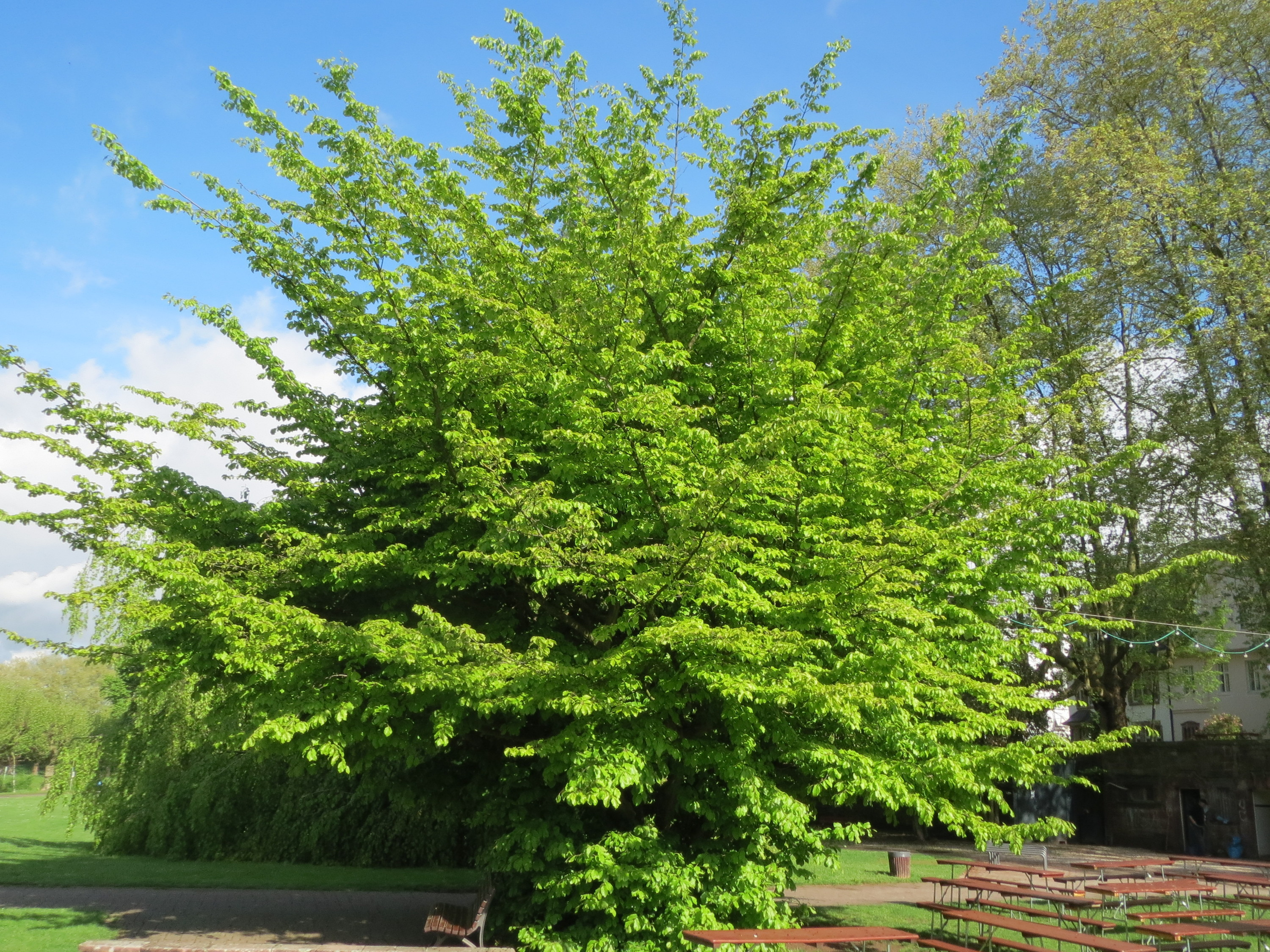 Persischer Eisenholzbaum (Parrotia persica) am Staden in Saarbrücken